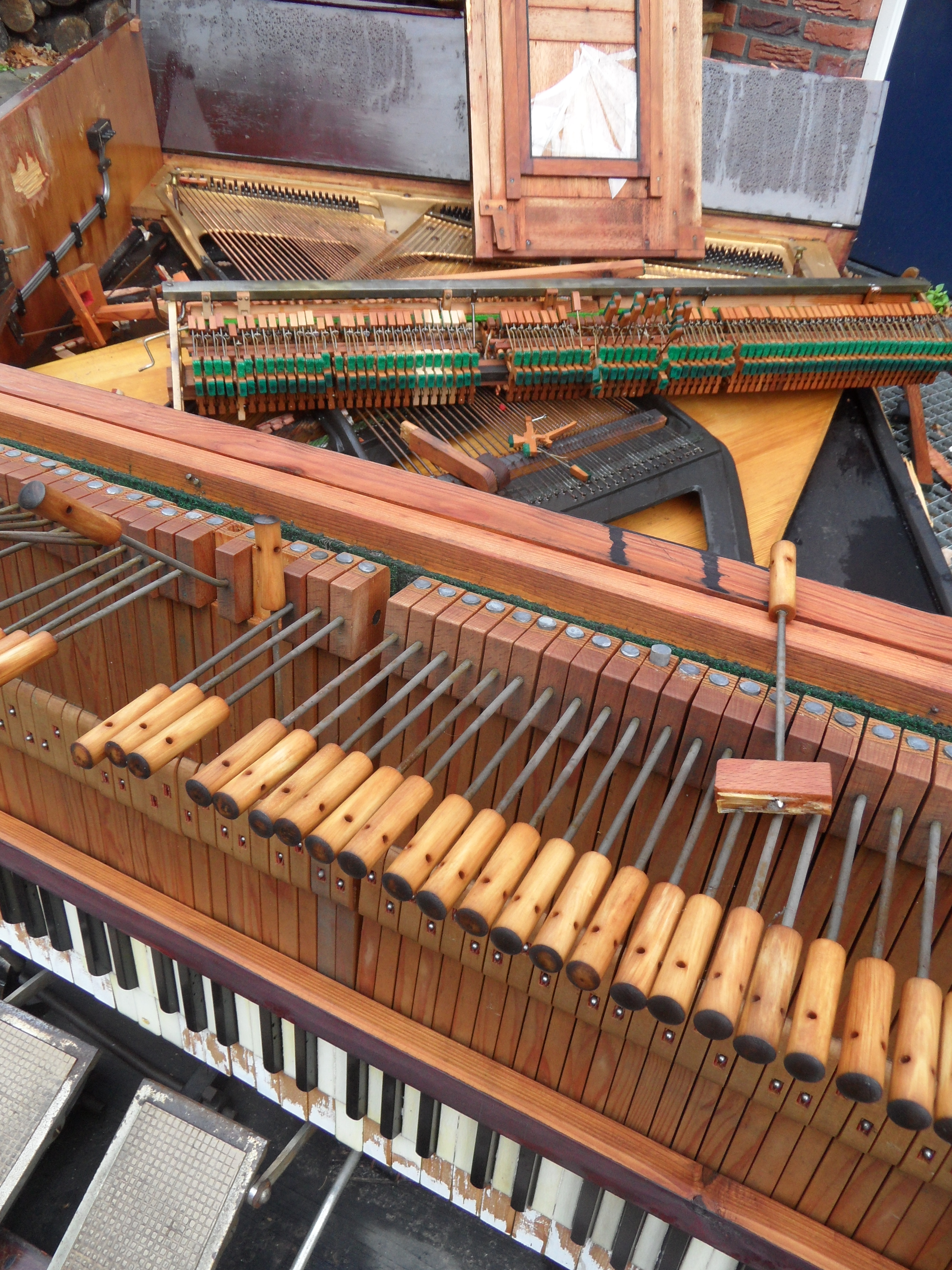 Foto gemaakt van een piano nadat deze vanaf een 4 meter hoog balkon op de grond kapot is gevallen en vervolgens een nacht op de grond heeft gelegen.